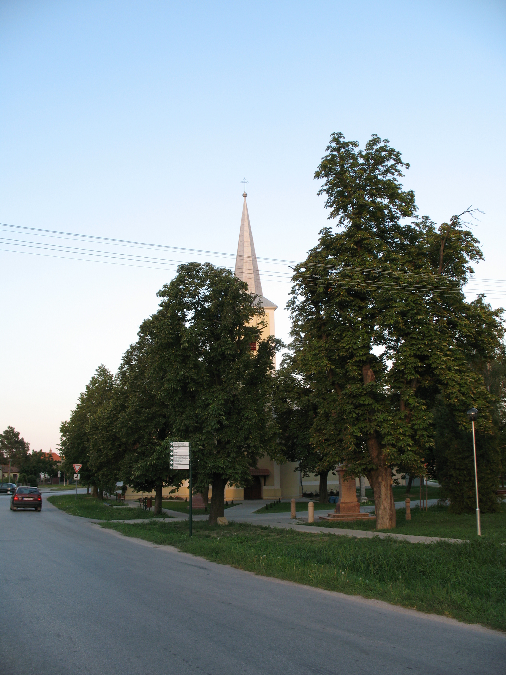 Zsigárd temploma